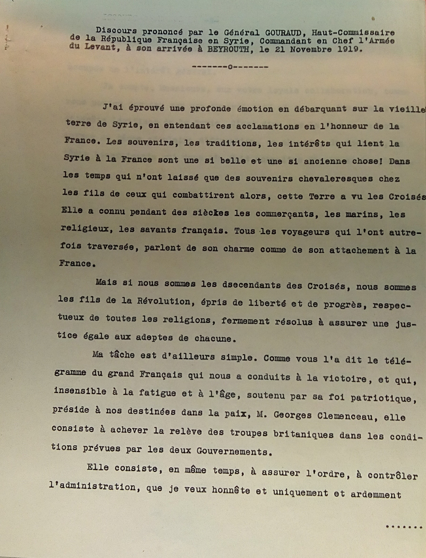 Version officielle du Discours de Gouraud lors de son arraivée à Beyrouth. Archives de la Courneuve (Fonds Gouraud, 399 PAAP/151)